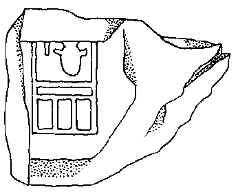 Tonsiegelbruchstück des Chefren